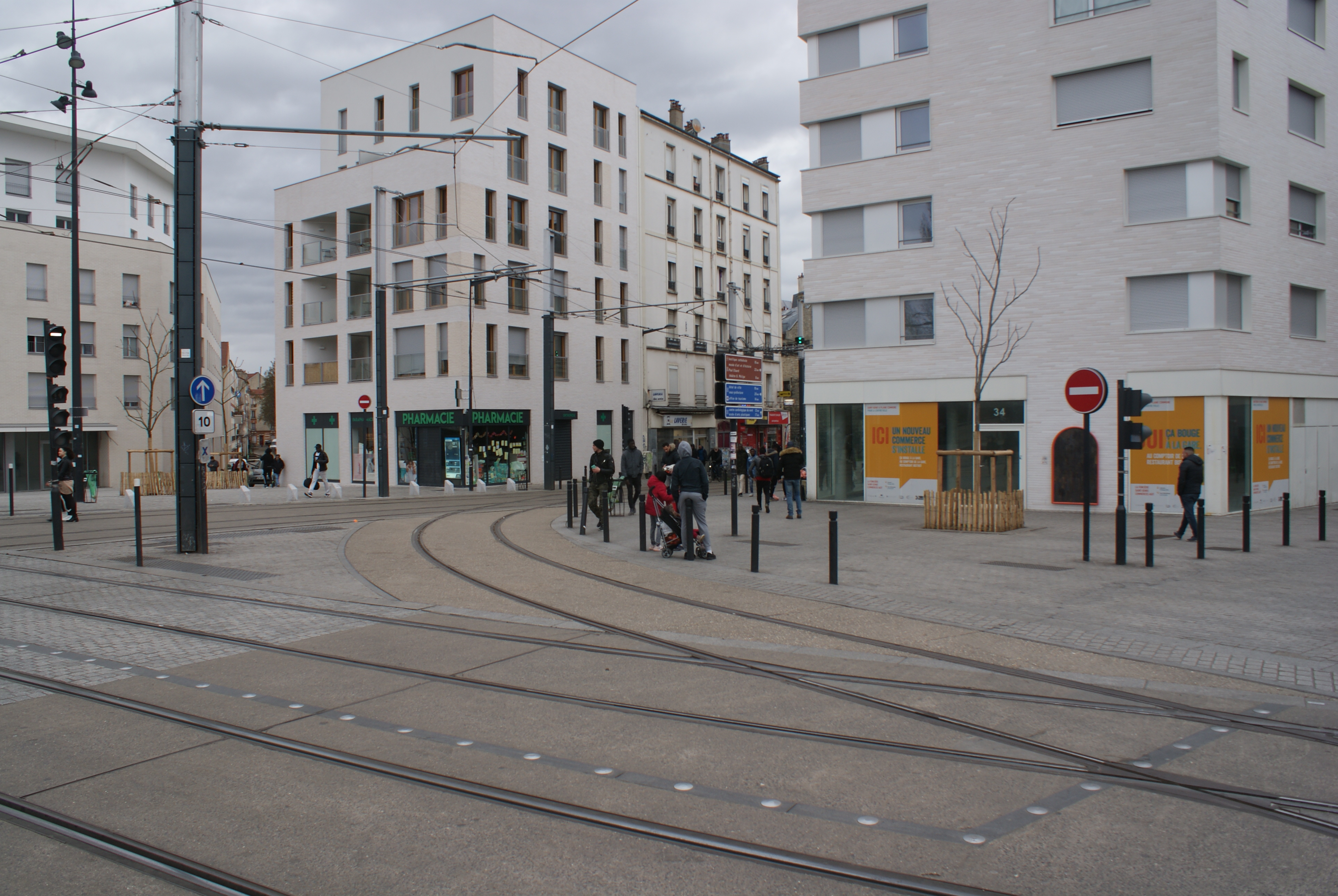 Raccordement entre les lignes T1 et T8 en 2020.